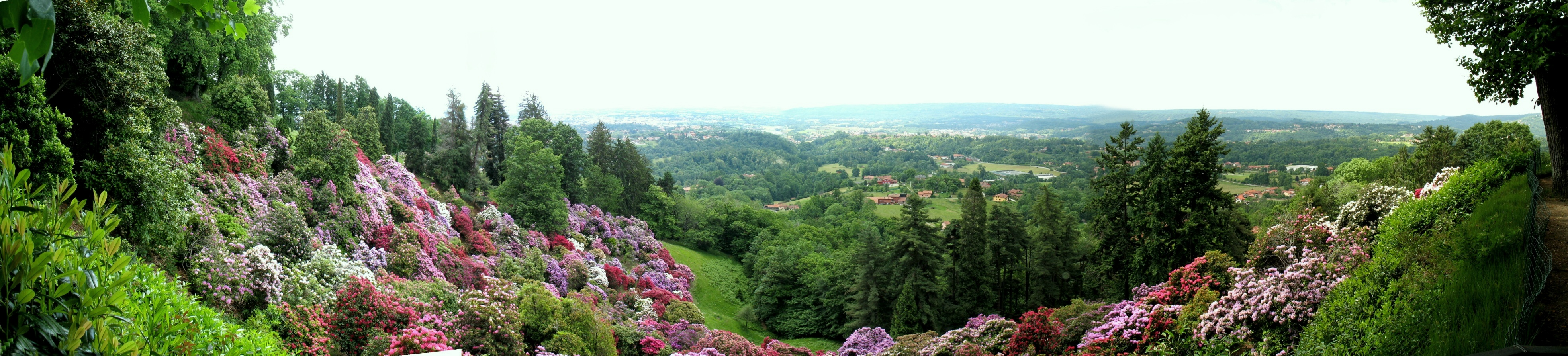 Parco della Burcina, Biella, Piemonte, Italia